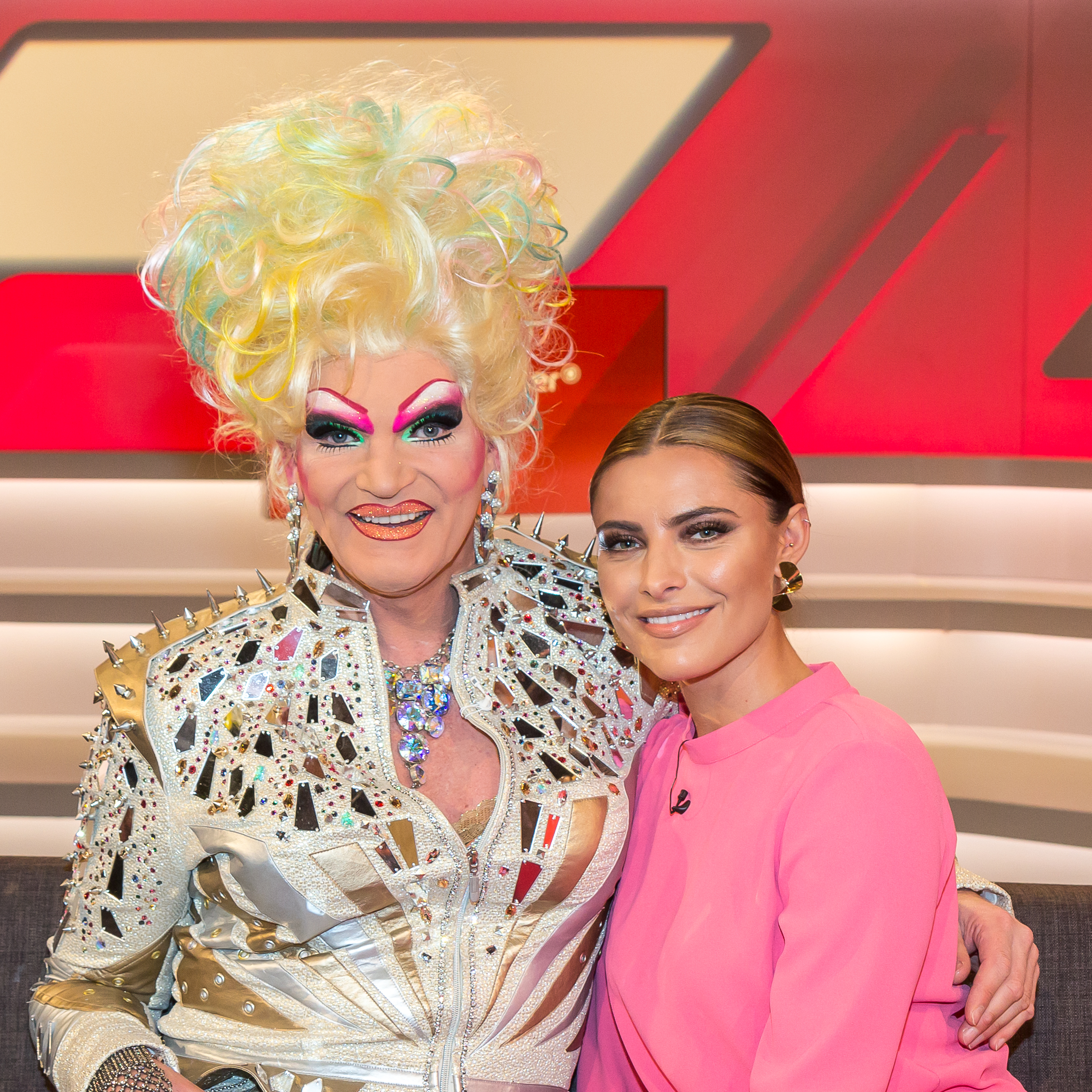 Maischberger, Sendung vom 13. Dezember 2017. Thema der Sendung: „Panikjahr 2017: Besser als befürchtet?“ Foto: Olivia Jones und Sophia Thomalla